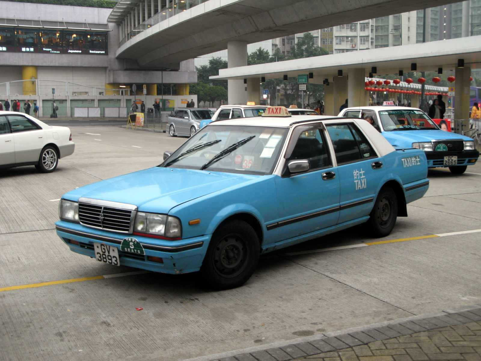 HK Taxi in Lantau Island